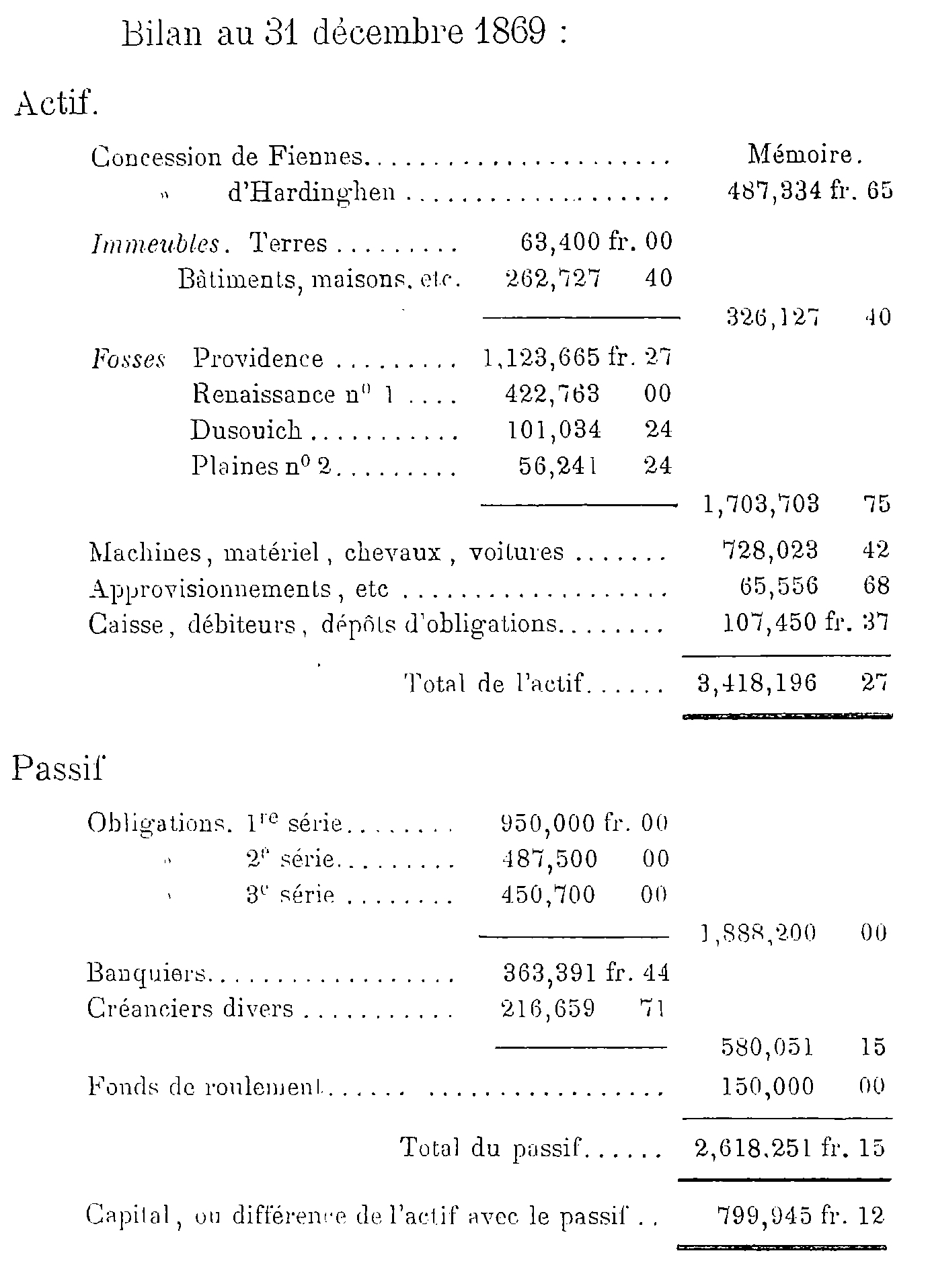 Bilan au 31 décembre 1869 de la Société de Fiennes.